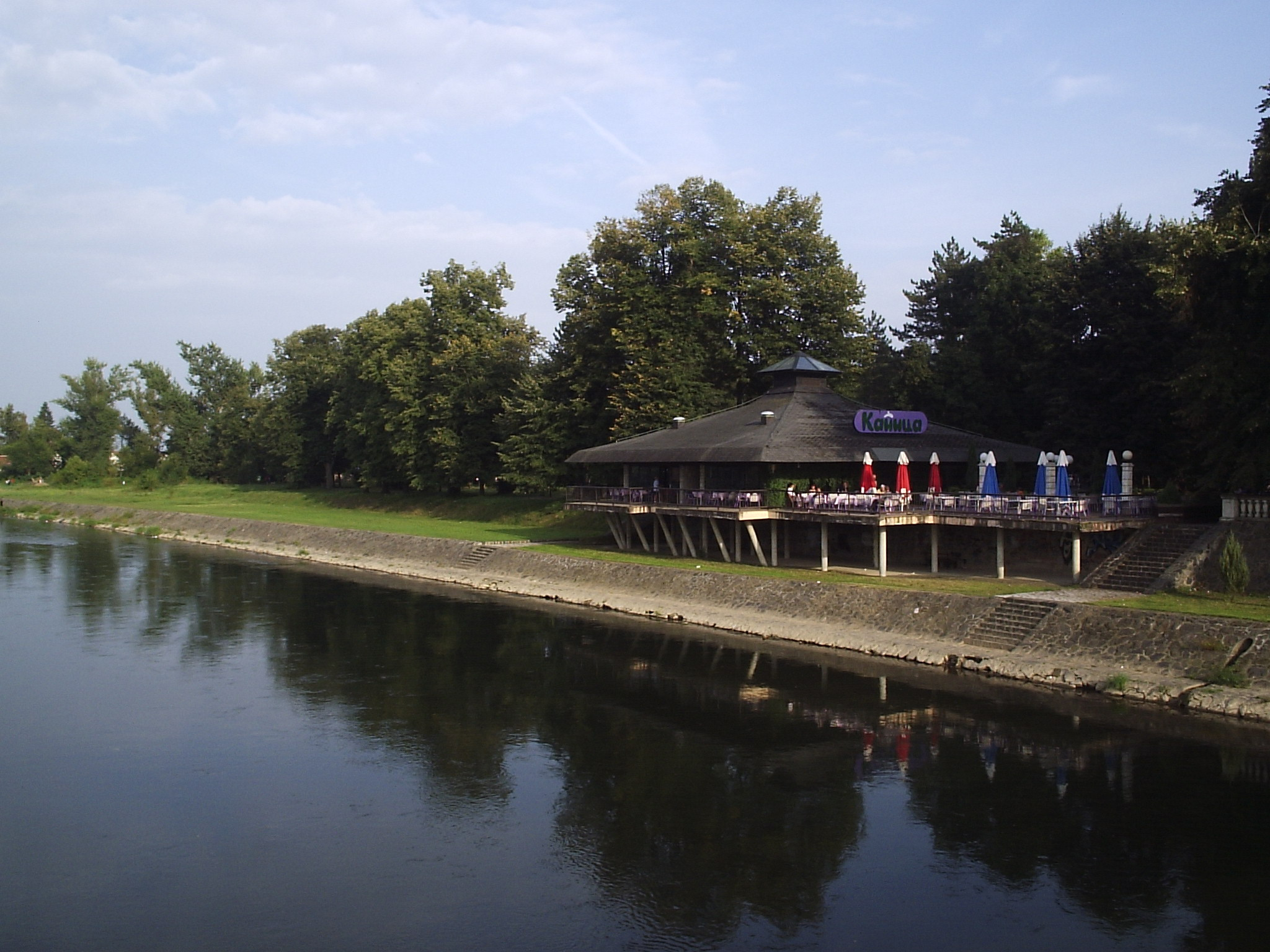 Кроз насеље Матарушка бања тече река Ибар.